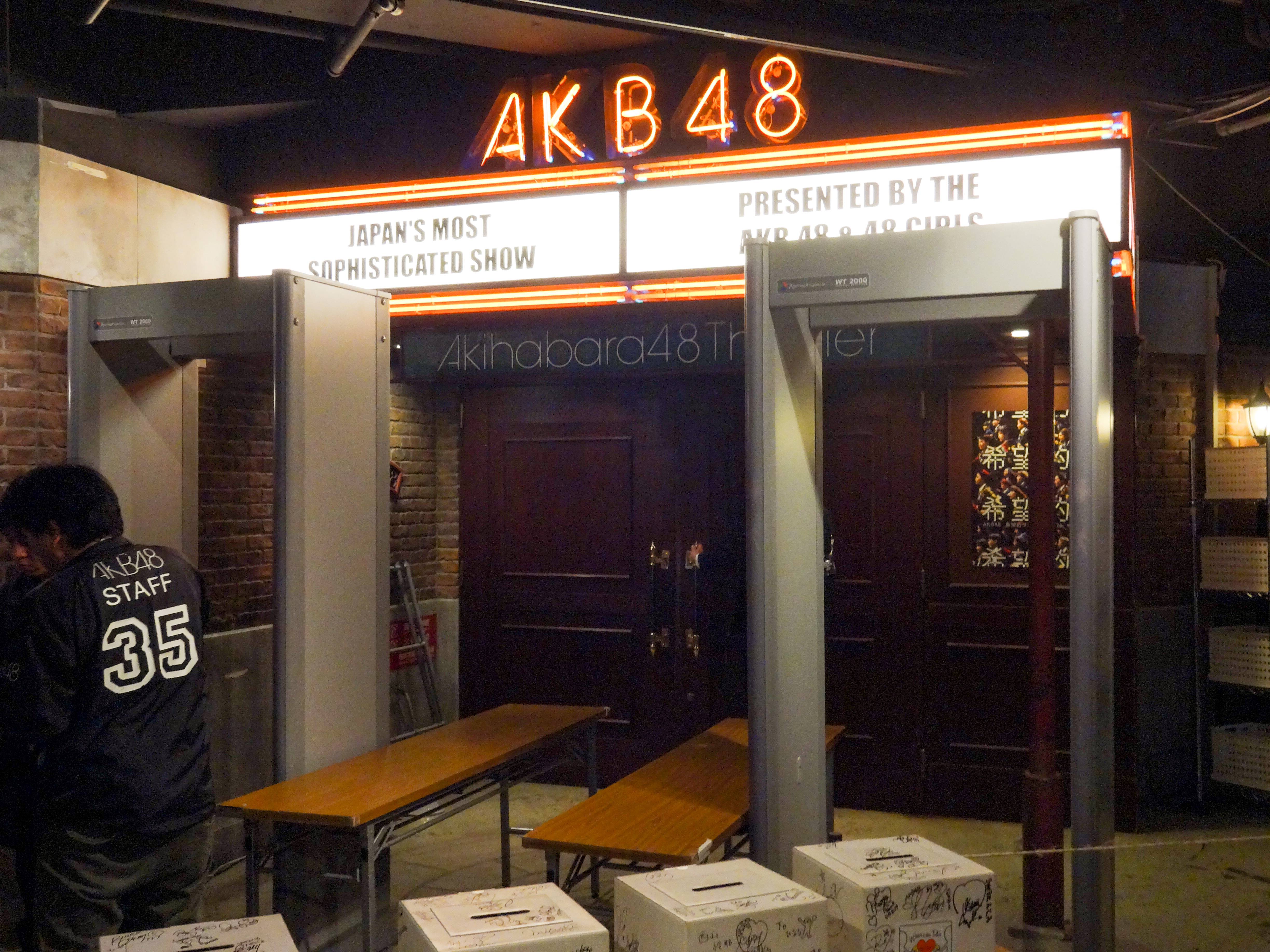 AKB48劇場 AKB48 ステージファイター 特別劇場公演 2014